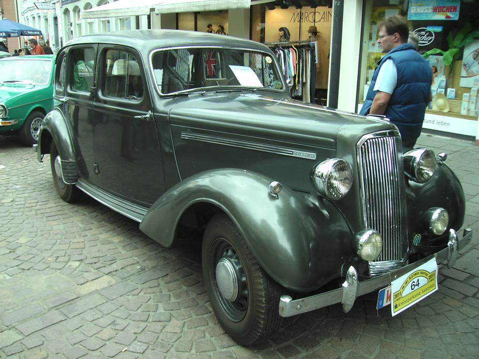 Humber Hawk Mark 1 (1946)